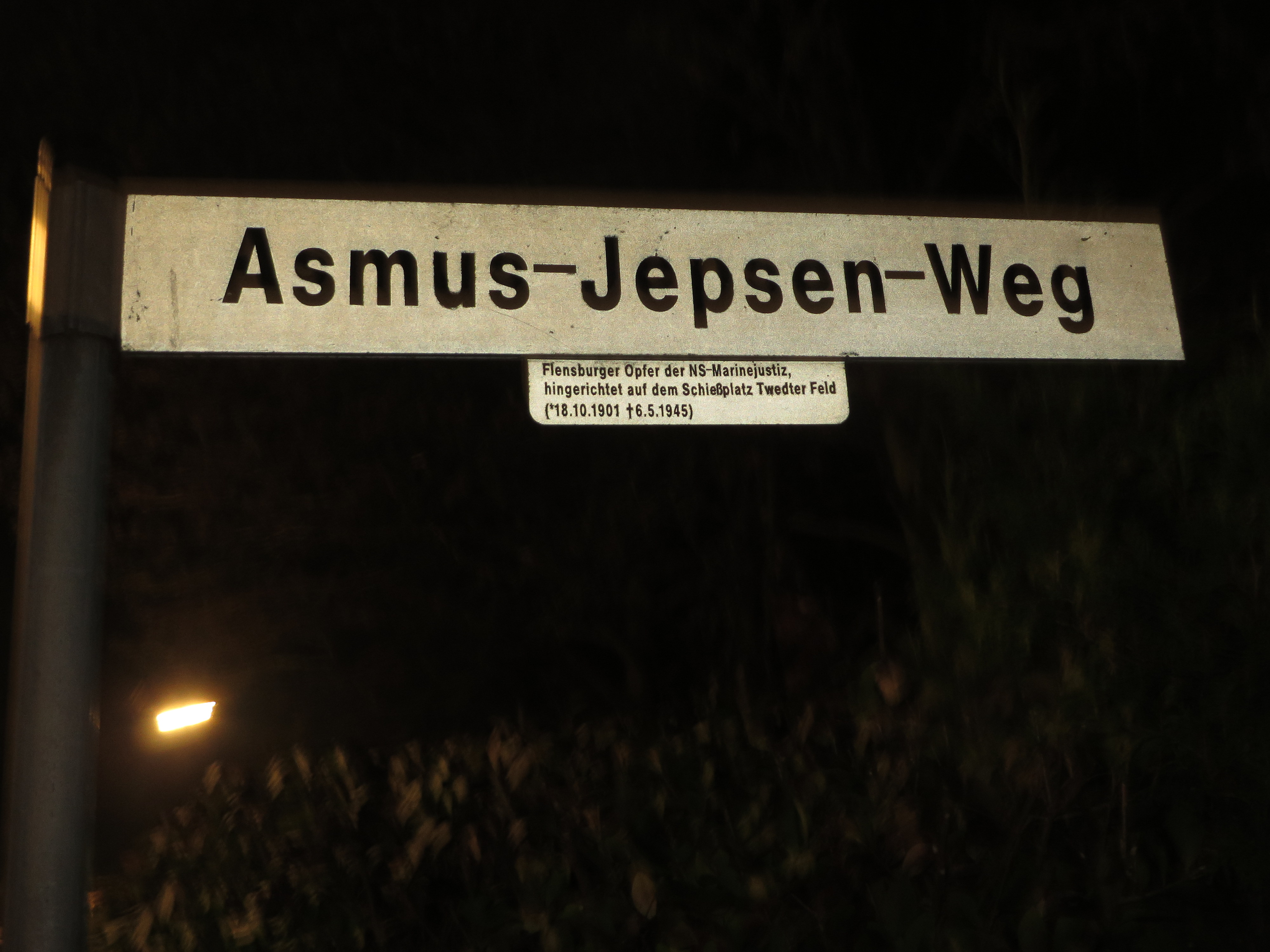 Straßenschild Asmus-Jepsen-Weg (Flensburg 2014-11-17), Bild 02